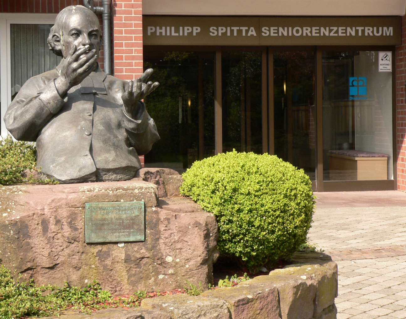 Denkmal für Carl Johann Philipp Spitta in Peine